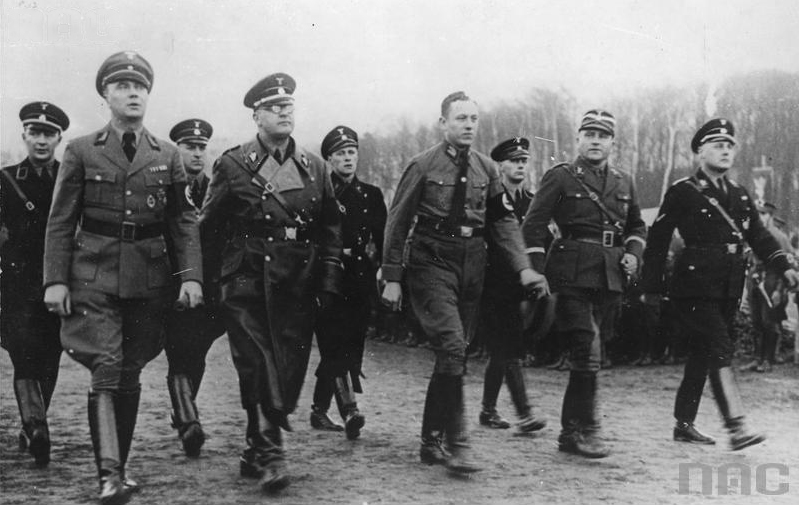 From left in foreground, Arthur Greiser, Erich von dem Bach-Zelewski, Albert Forster, Heinrich Hacker, Wilhelm Koppe